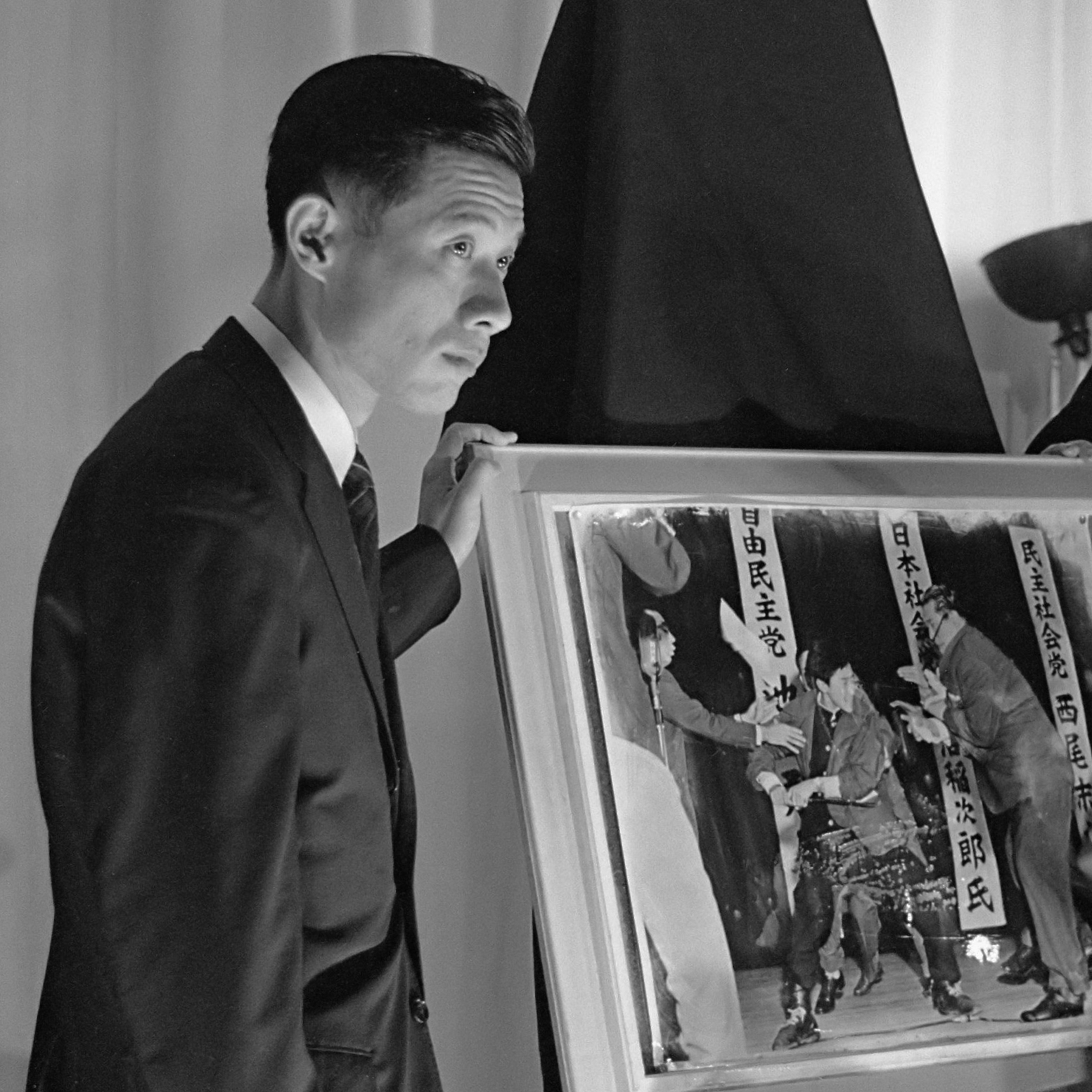 Opening World Press Photo 61 . Nagao tijdens toespraak 2 oktober 1961